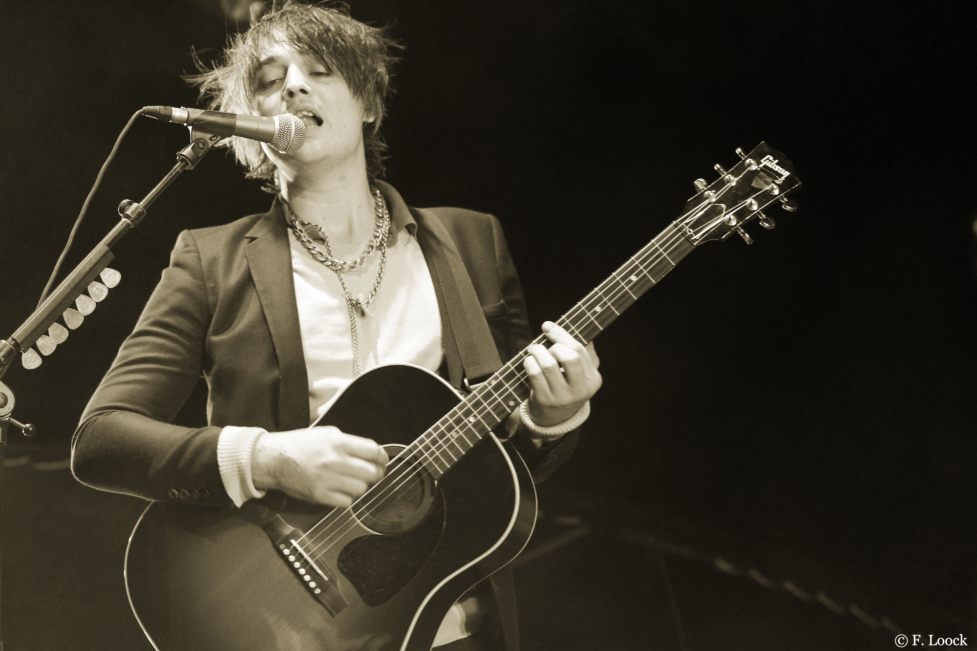 Pete Doherty au Festival We Love Green à Paris le 11 septembre 2011